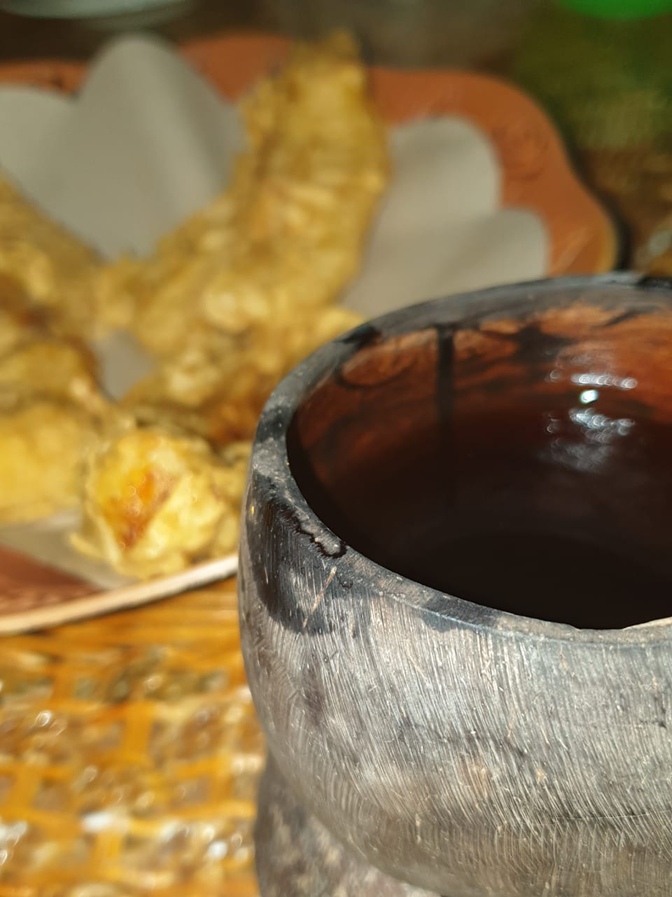 Kawa daun, merupakan minuman yang berasal dari daun kopi yang diseduh layaknya teh dan biasa disajikna bersama gorengan